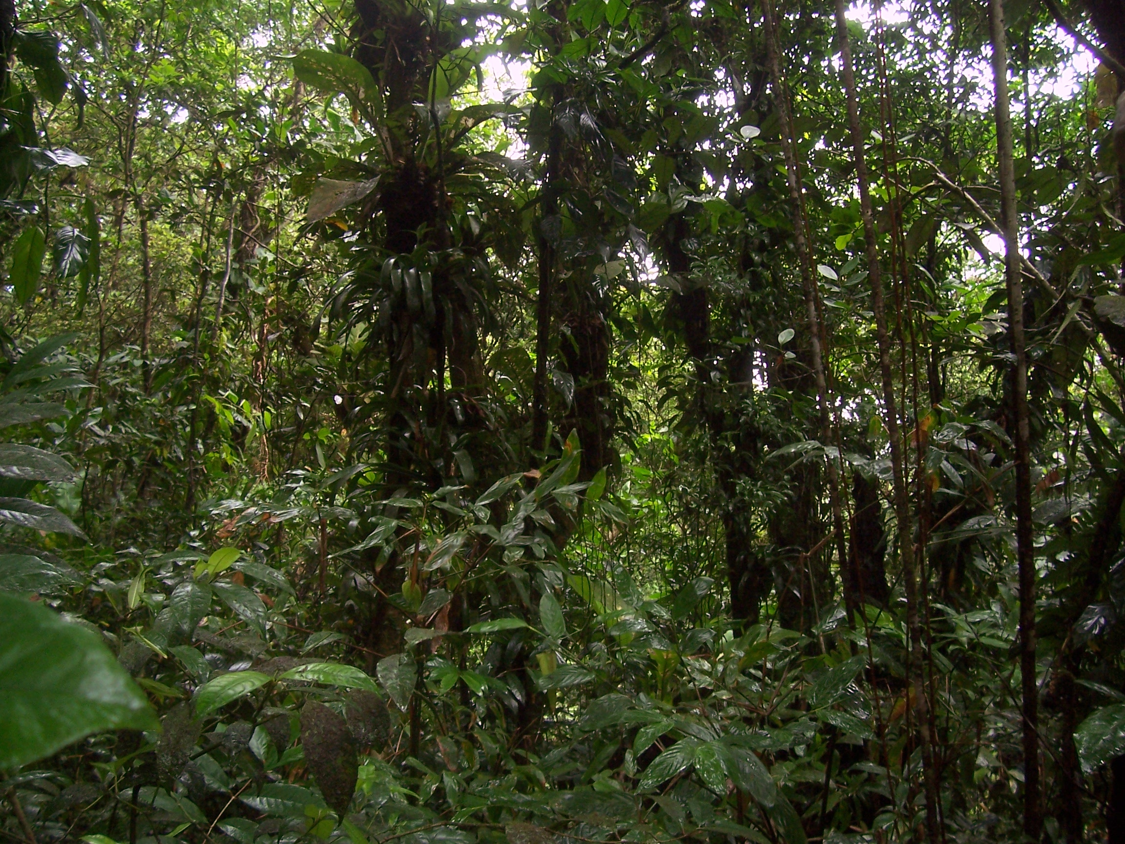 El bosque del Parque recoje la humedad